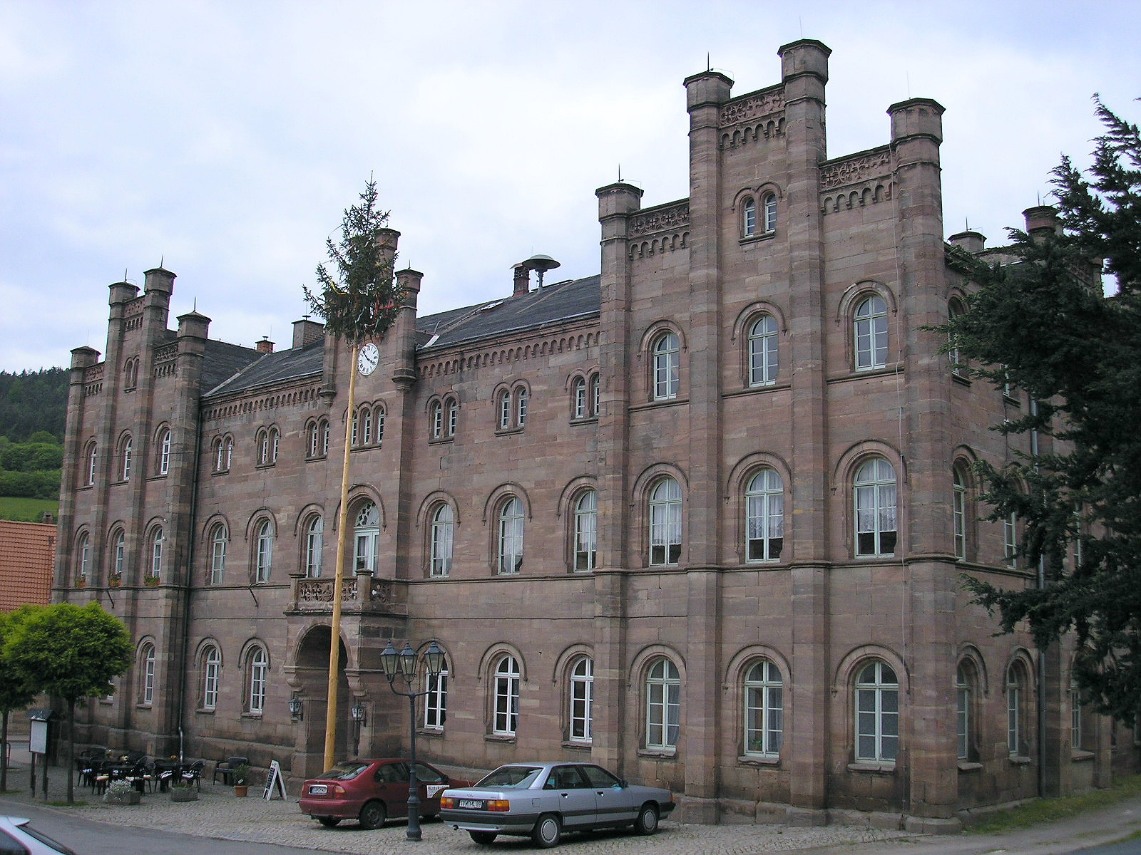 Rathaus von Teichel (Thüringen).